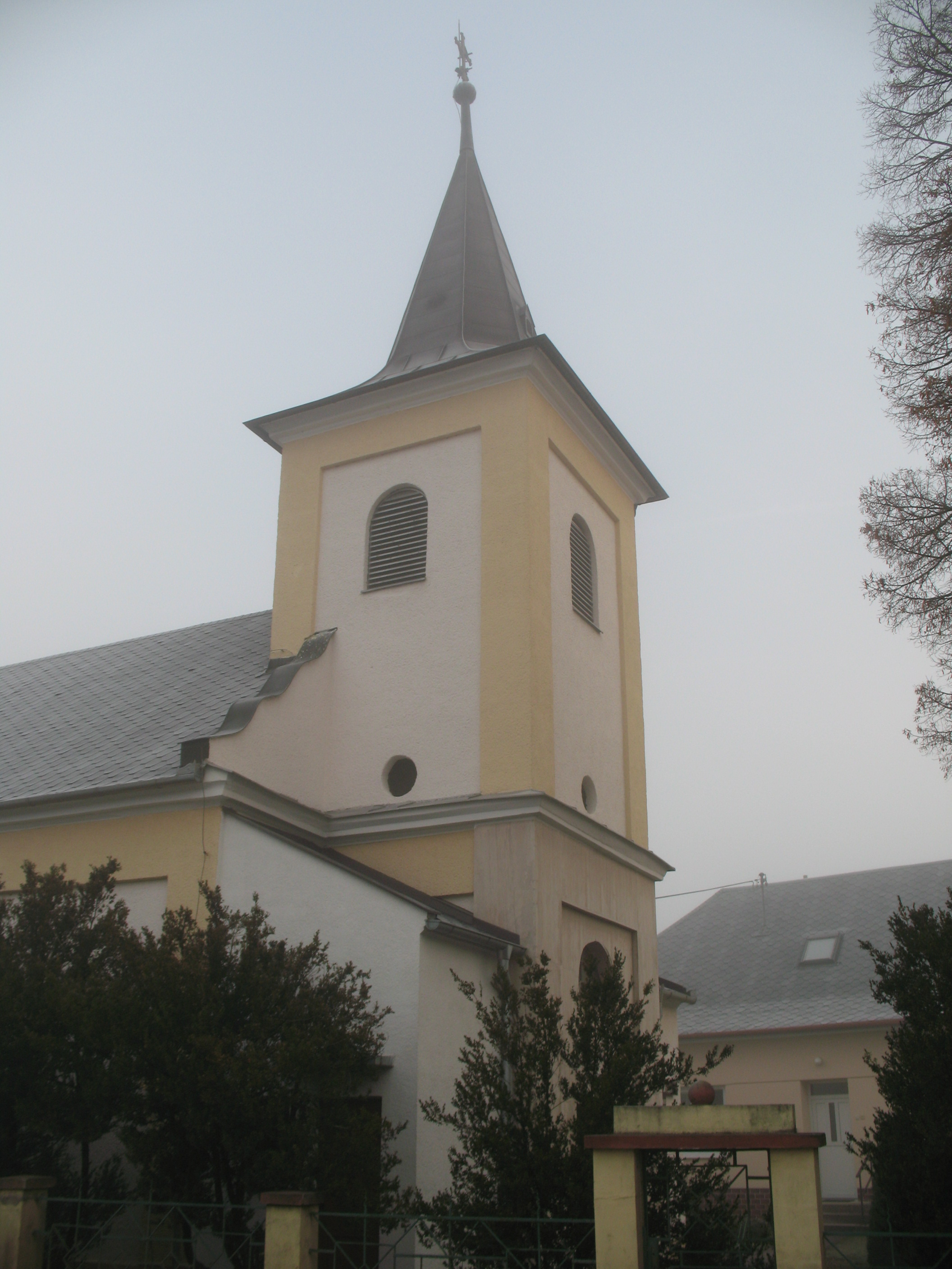 Salgó